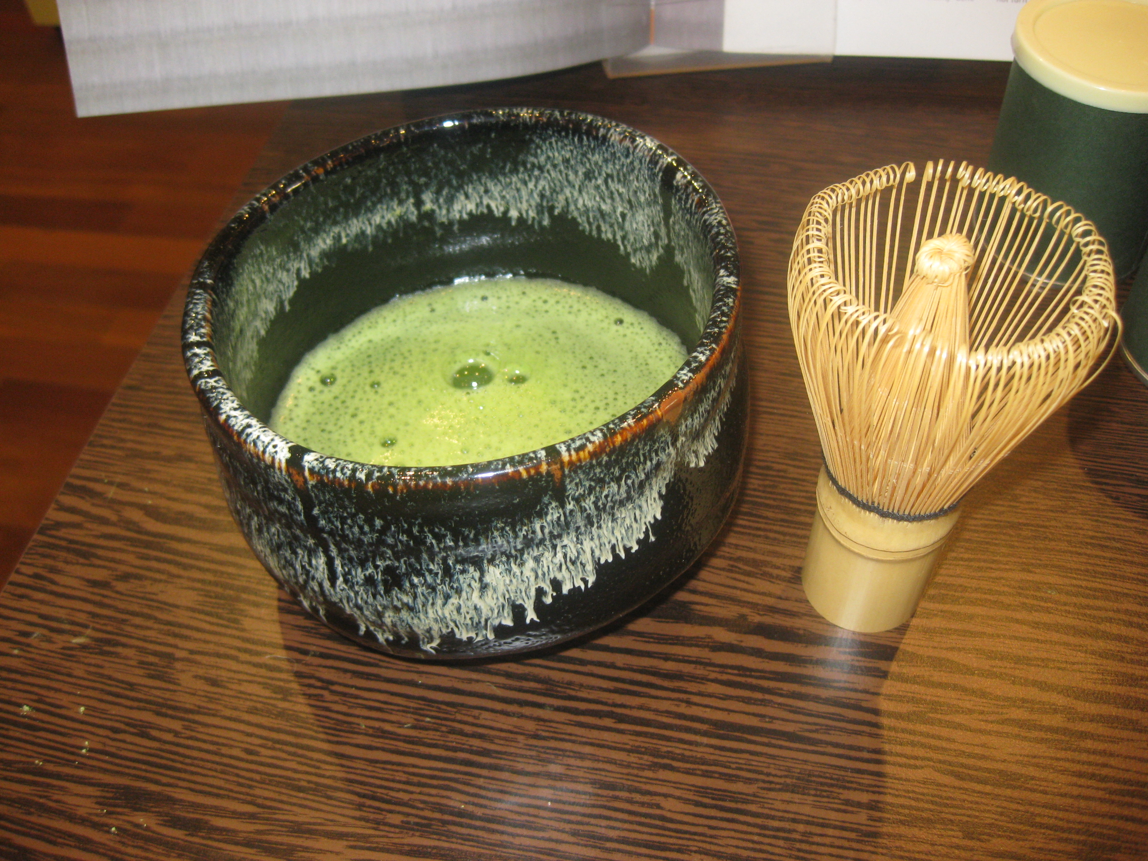 צ'אזן, ומאצ'ה בקערת תה